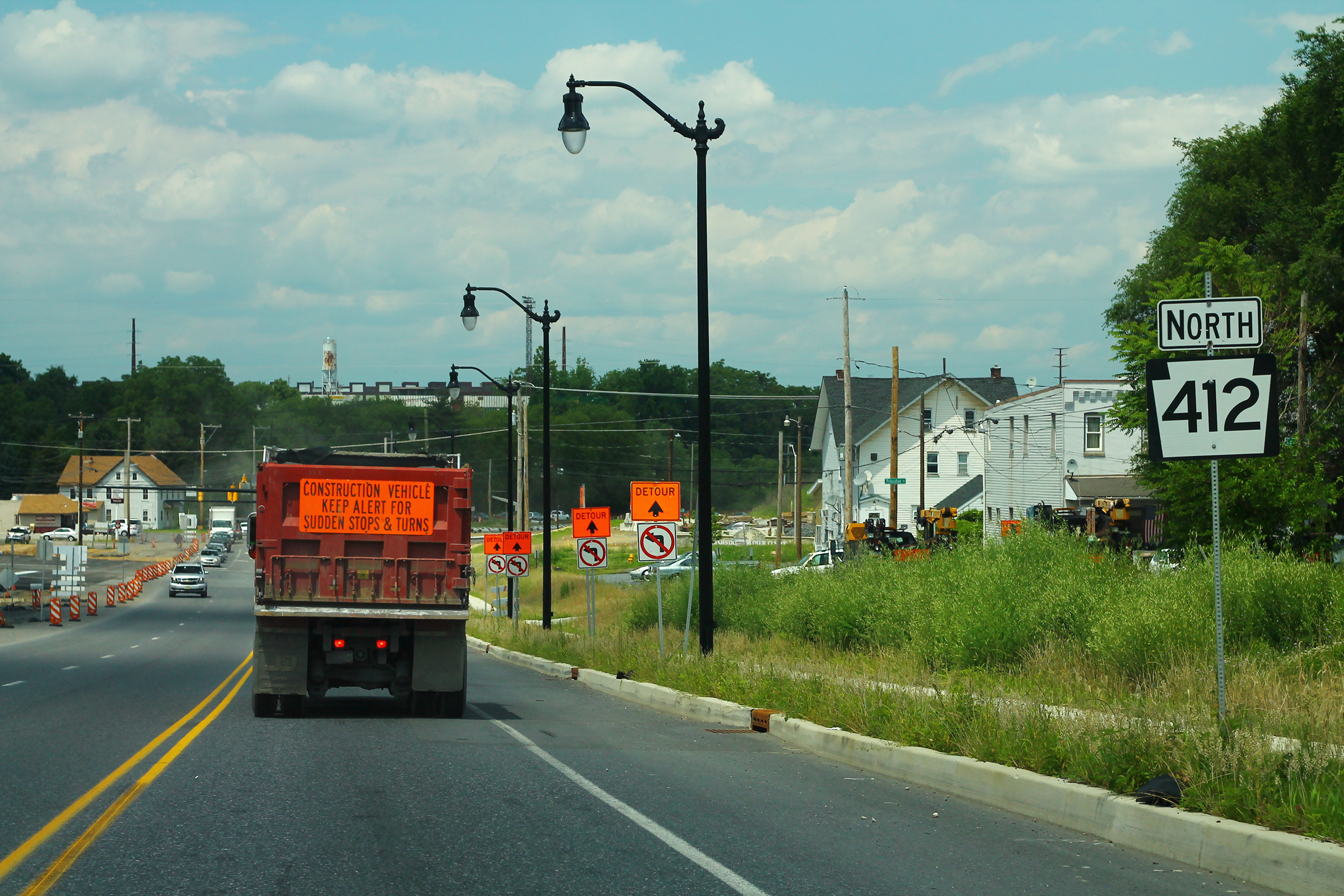 PA412 North Sign - Bethlehem